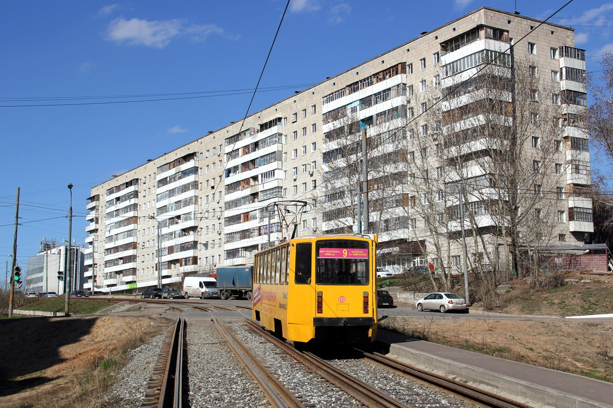 Казанский трамвай КТМ-8М № 1117 сзади на фоне типовой дома 1-528КП-42. Улица Энергетиков, Казань